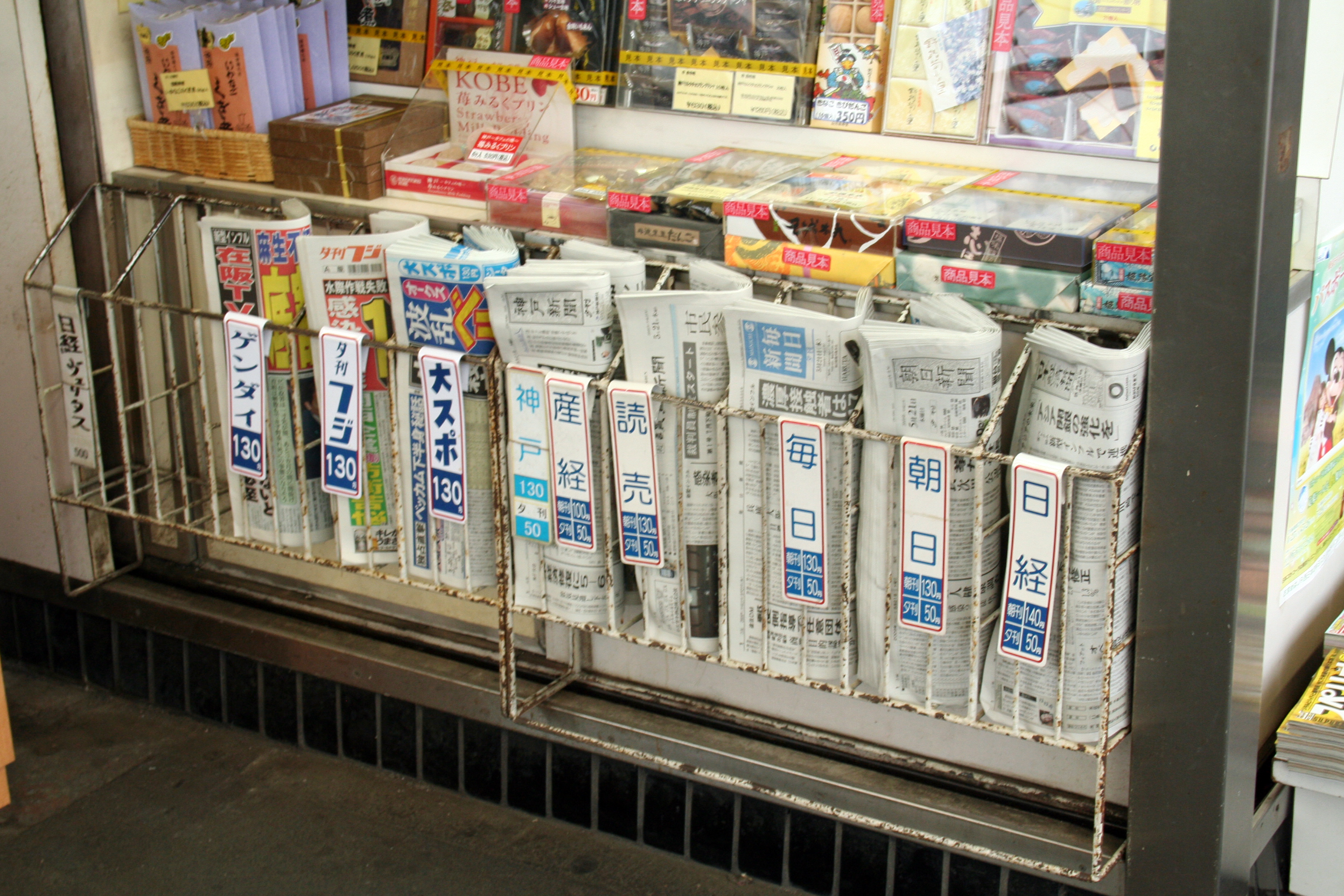 JR西日本の姫路駅。新幹線及びJRのホームなど。キオスクの新聞スタンド。